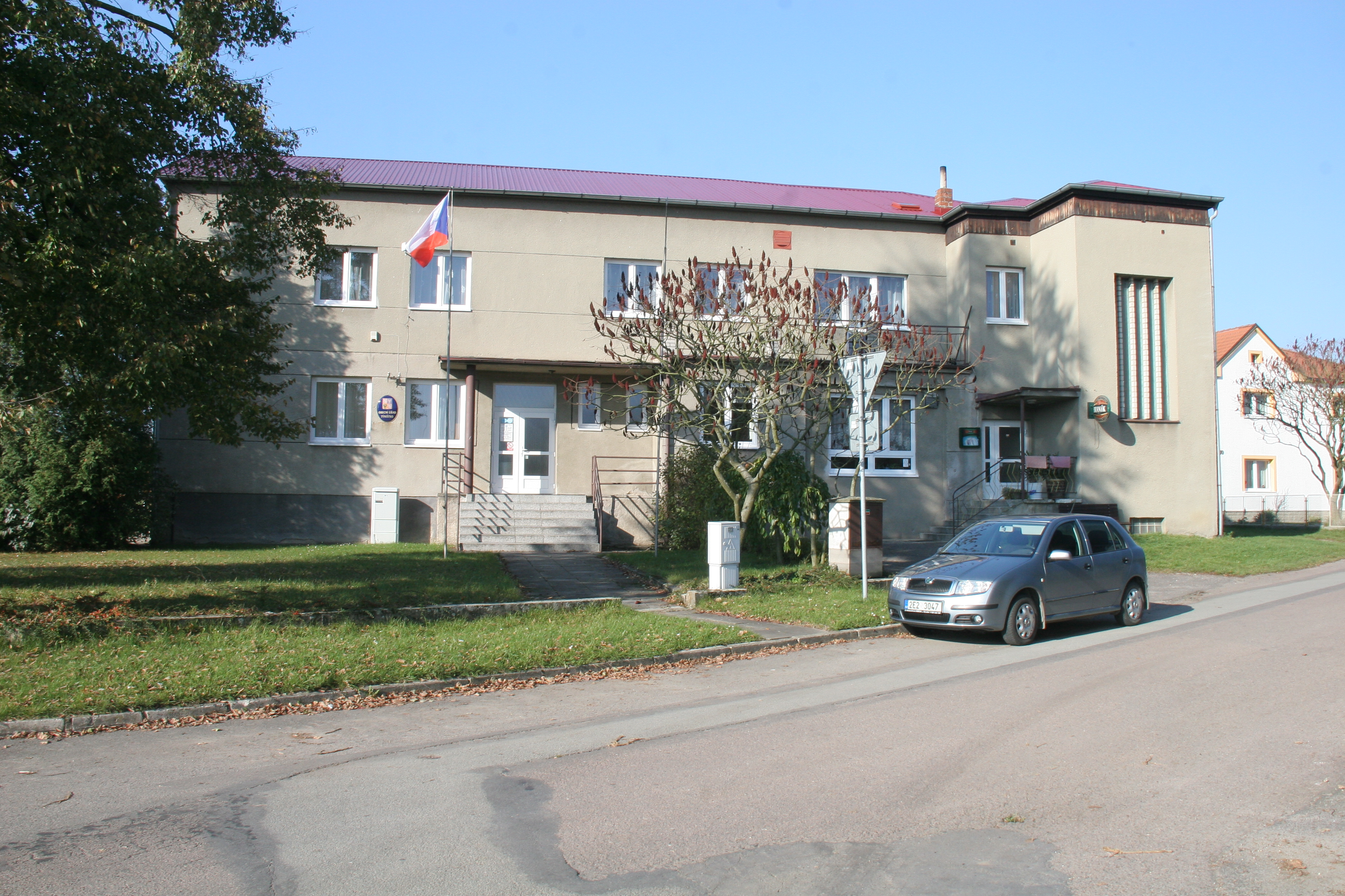 Týnišťko obecní úřad